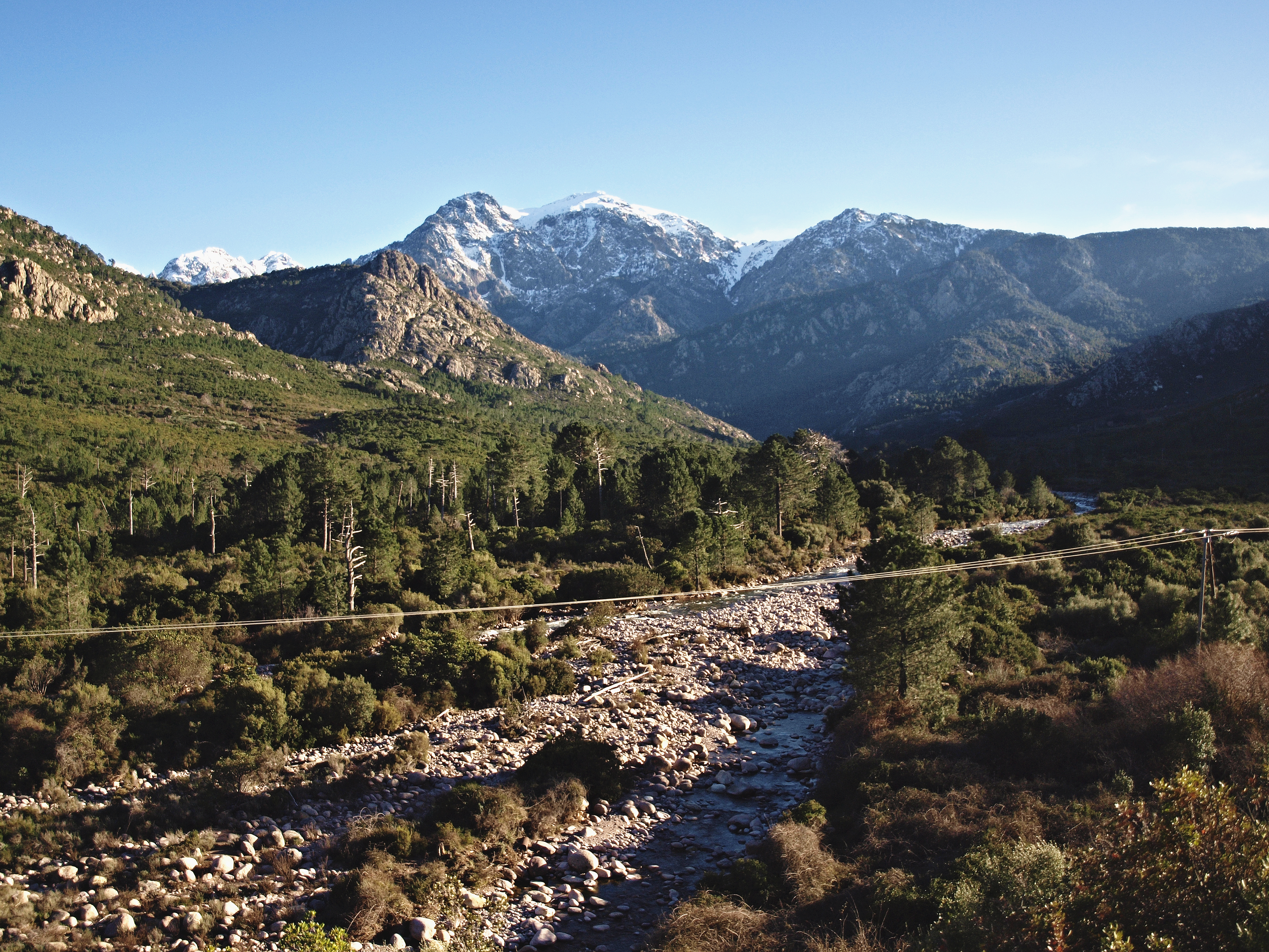 Calenzana (Corsica) - La Figarella et le Cirque de Bonifatu